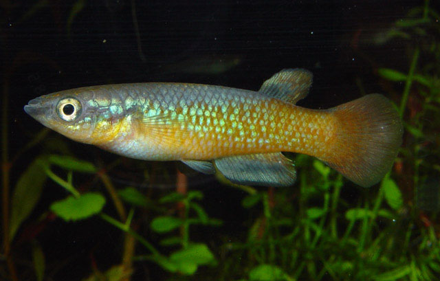 Panchax del río Sakaramy (Pachypanchax sakaramyi)